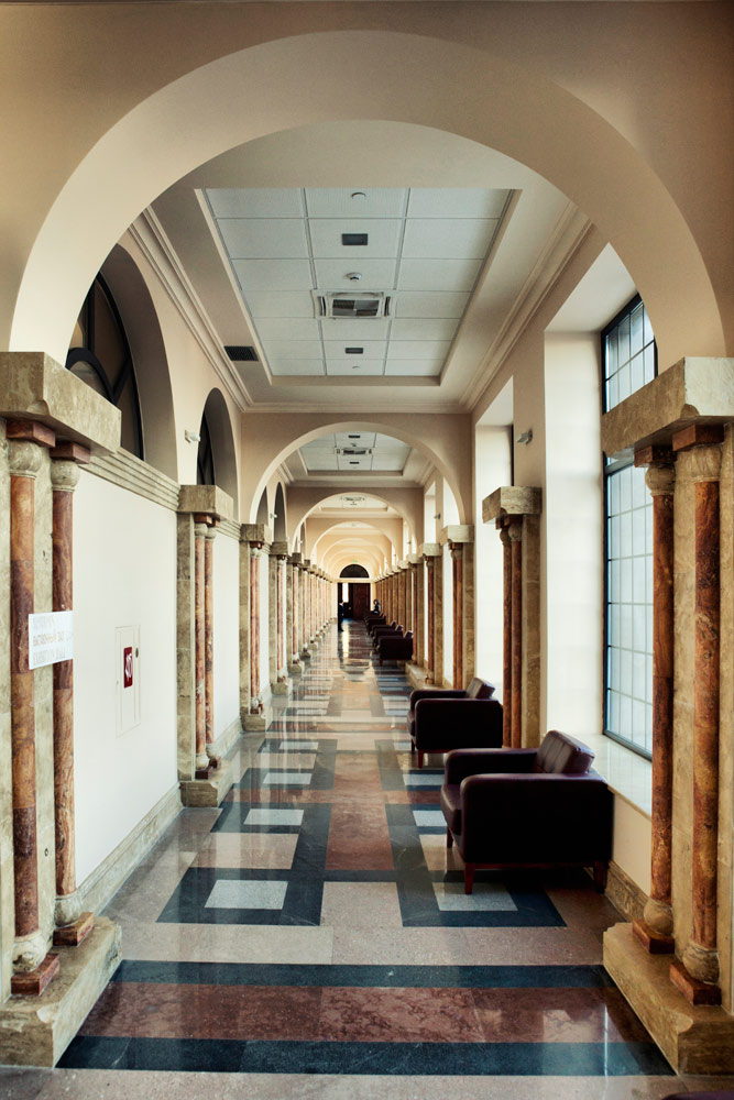 Matenadaran 6. Architect Arthur Meschian, 2011